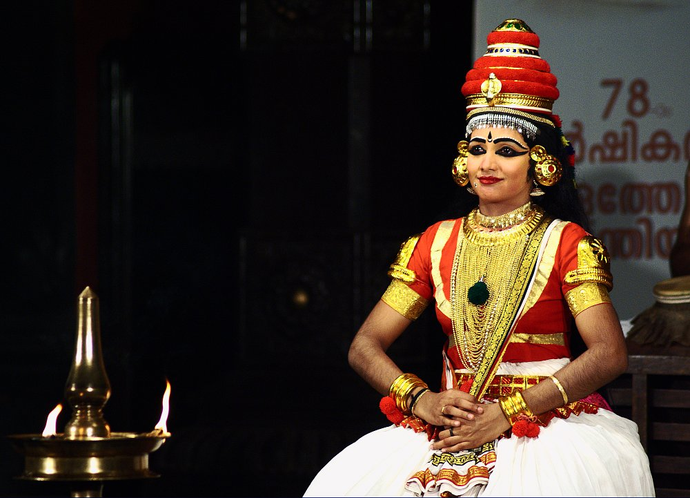 കൂടിയാട്ടത്തിലെ സ്ത്രീ വേഷം